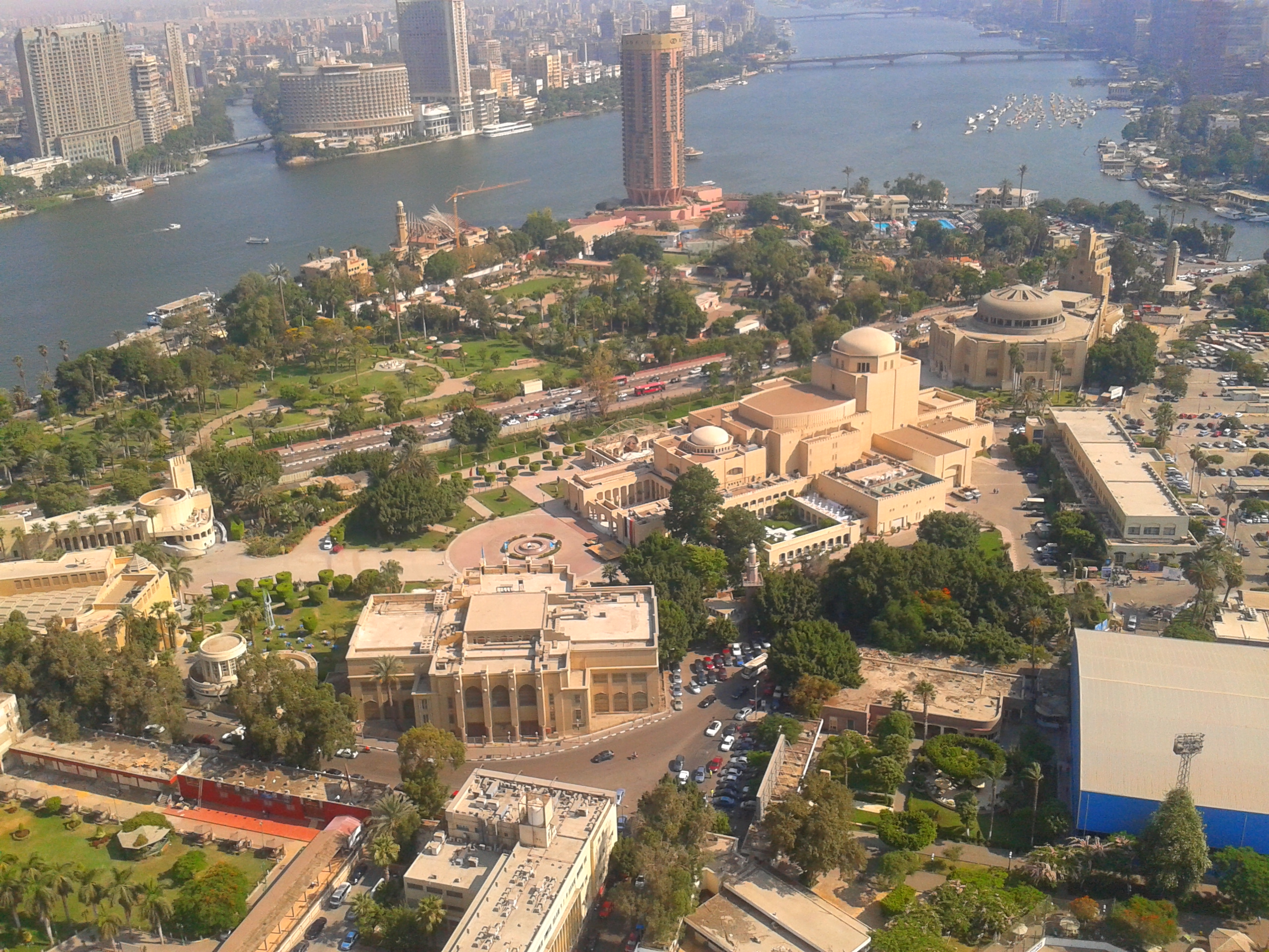 دار الأوبرا المصرية من أعلى برج القاهرة